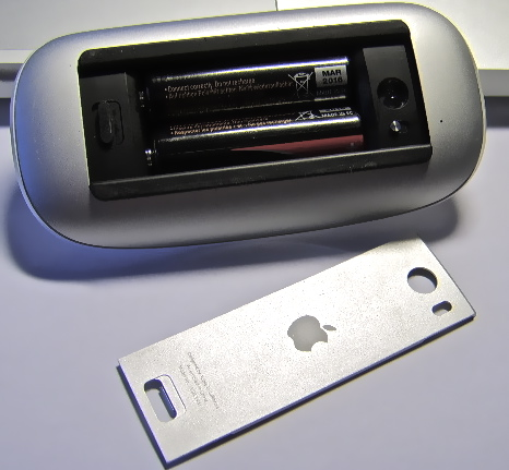 Magic Mouse alt vaadates (kaas maha võetud)